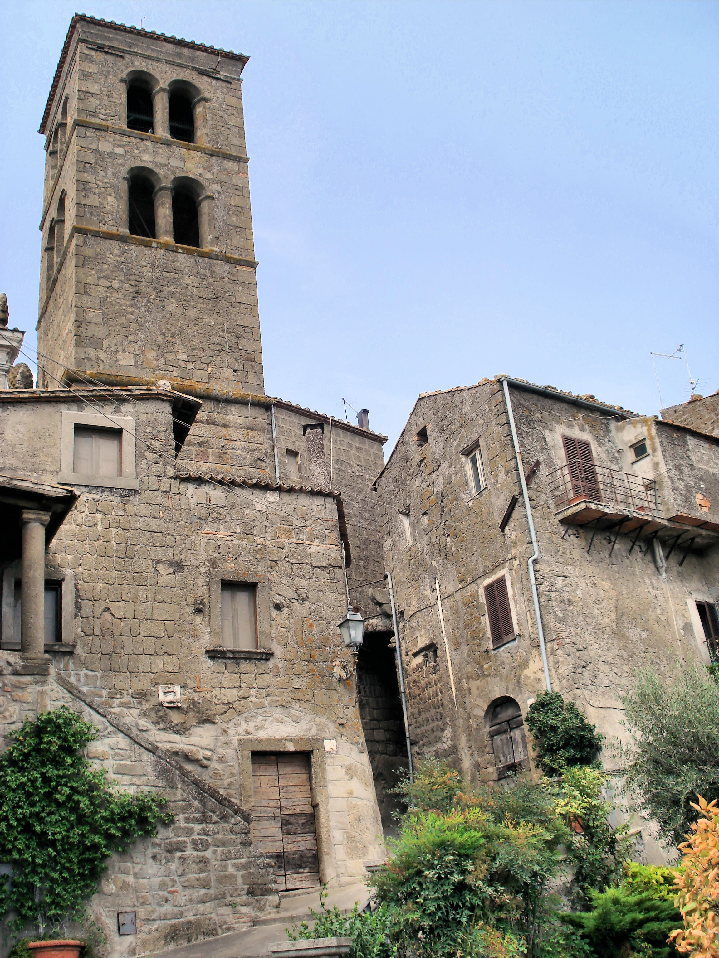 Cosmin latan,Il Campanile-Bomarzo